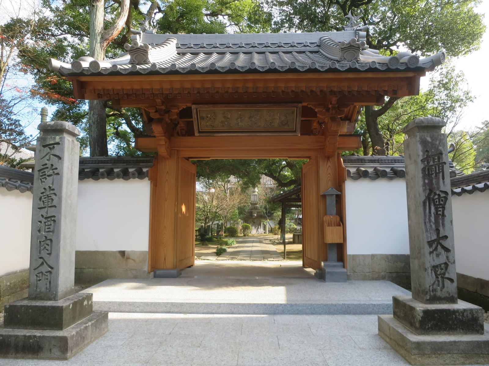 昌光律寺（岡崎市伊賀町）